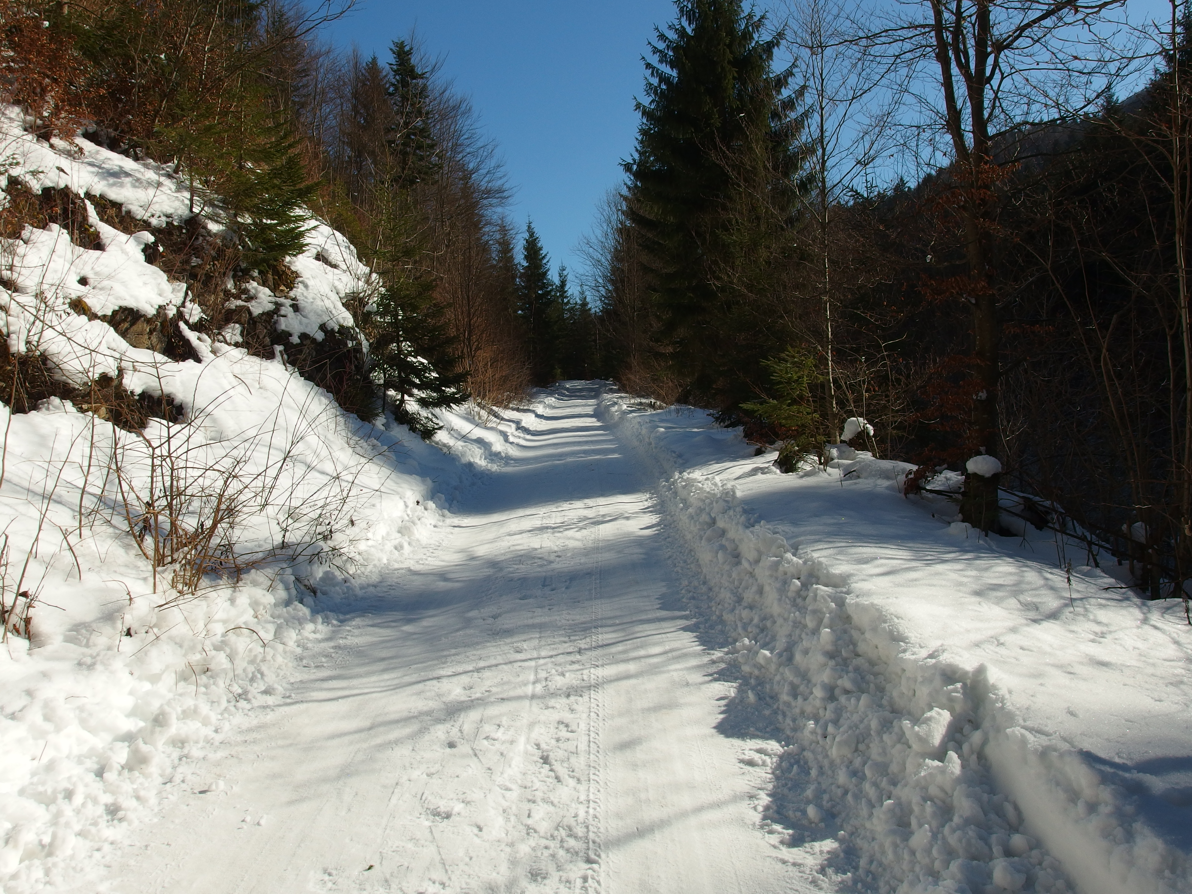 Zimná cesta v Hornojasenskej doline